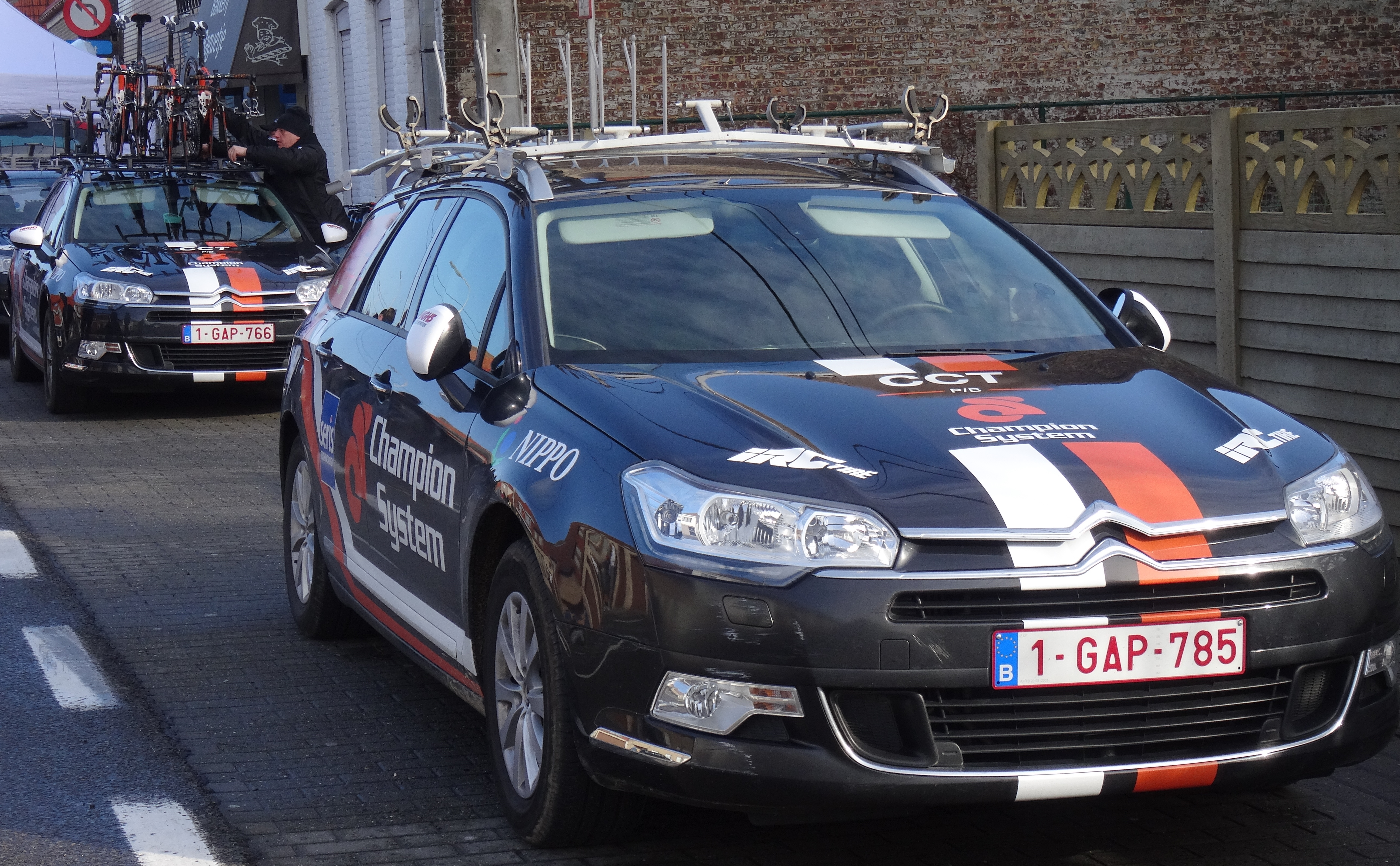 Reportage réalisé le dimanche 1er mars à l'occasion du départ et de l'arrivée de Kuurne-Bruxelles-Kuurne 2015 à Kuurne, Belgique.